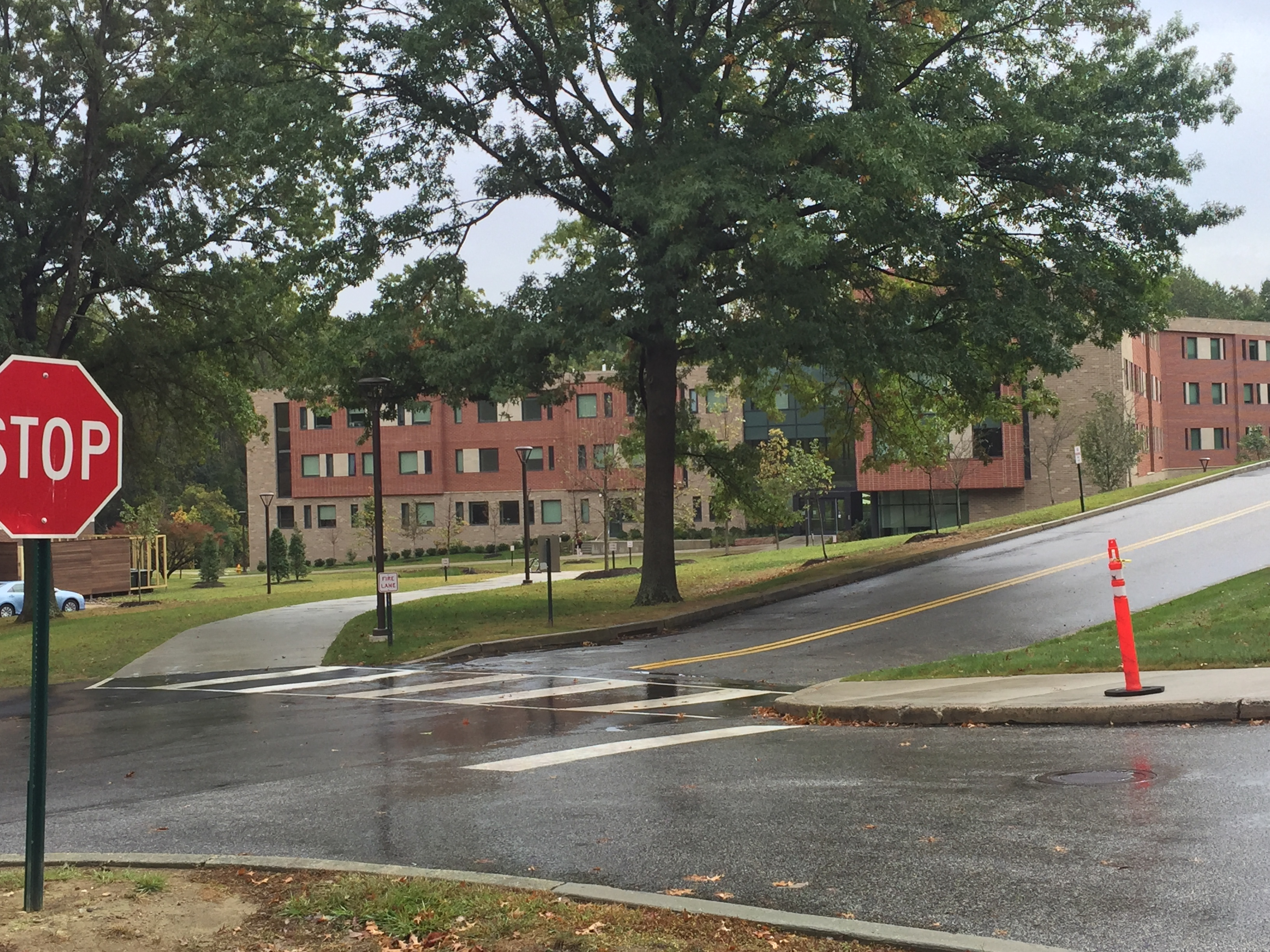 Orchard hall